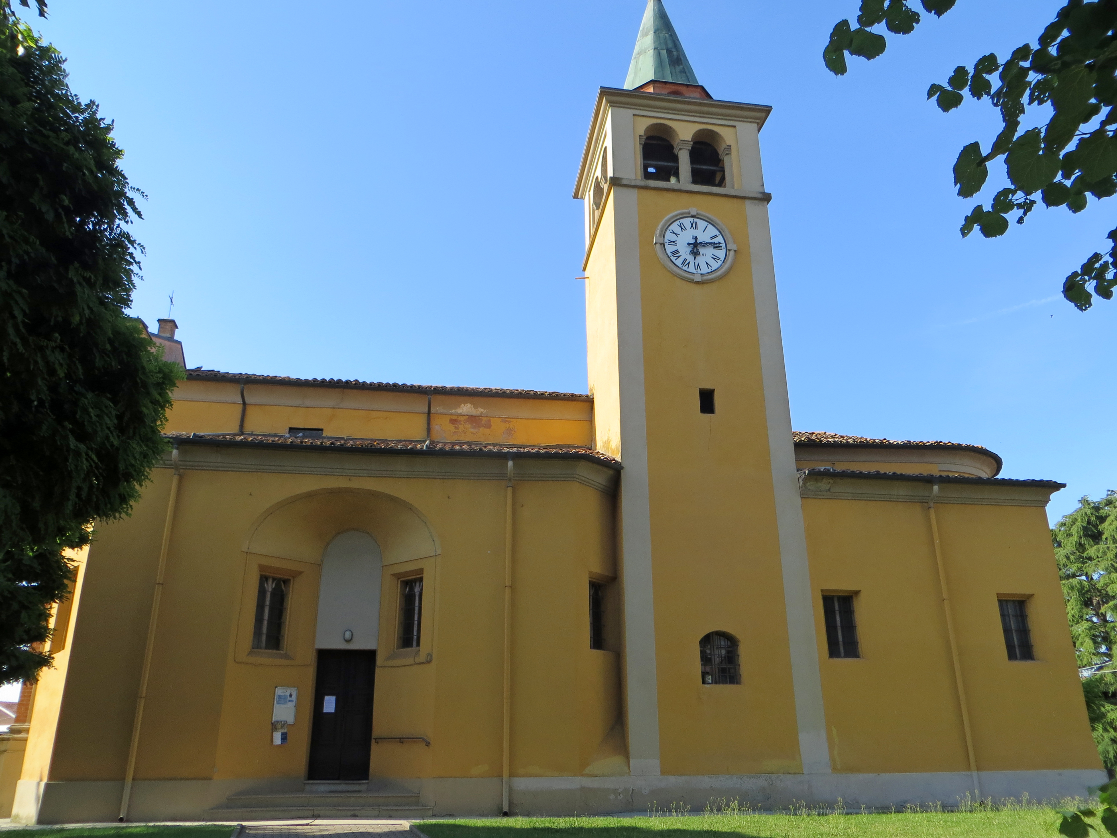 Chiesa di Santo Stefano (Basilicagoiano, Montechiarugolo) - lato sud